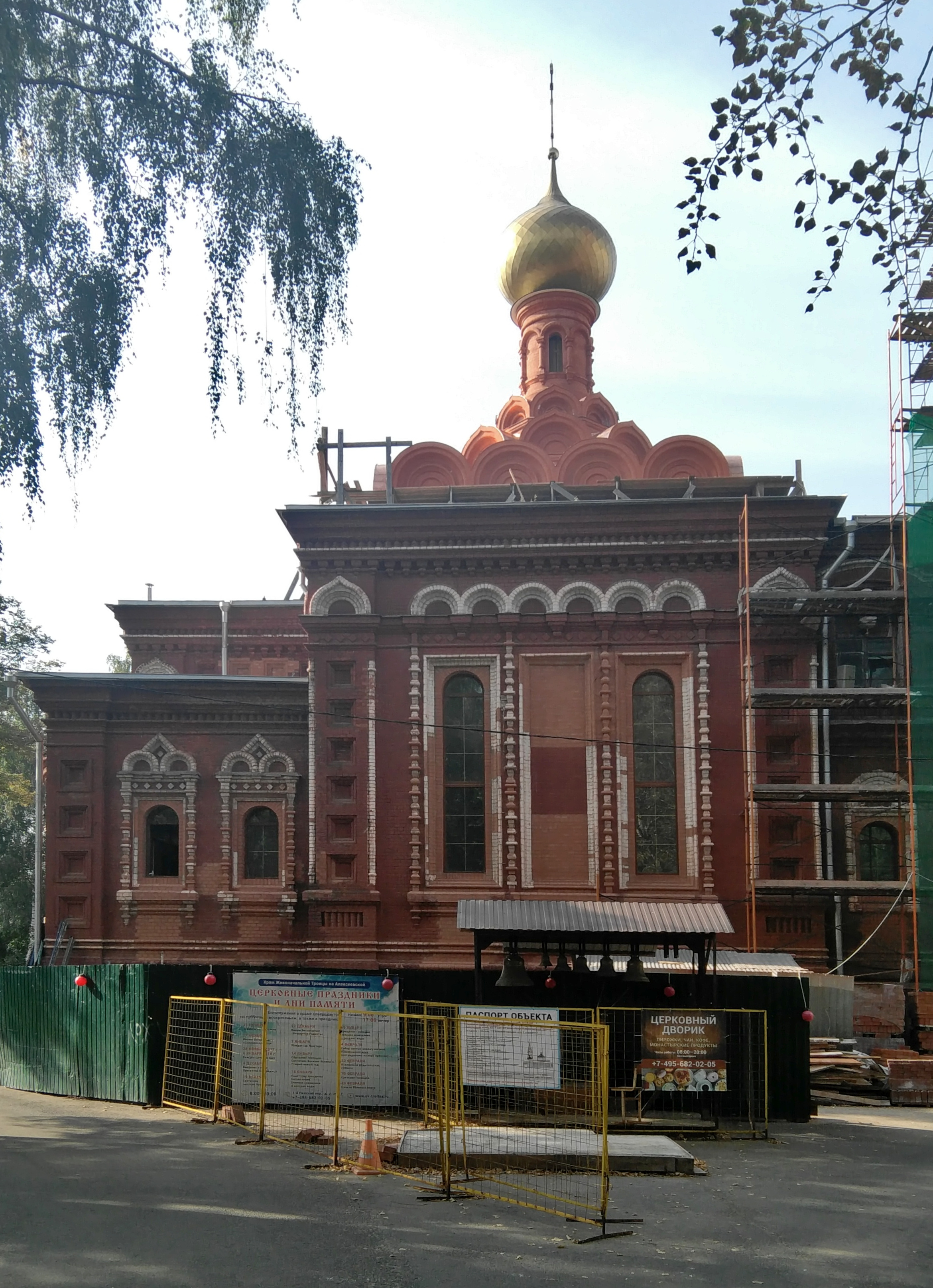 Храм Живоначальной Троицы: Рижский 1-й пер., дом 2, строение 7, Алексеевский, Северо-Восточный округ, Москва